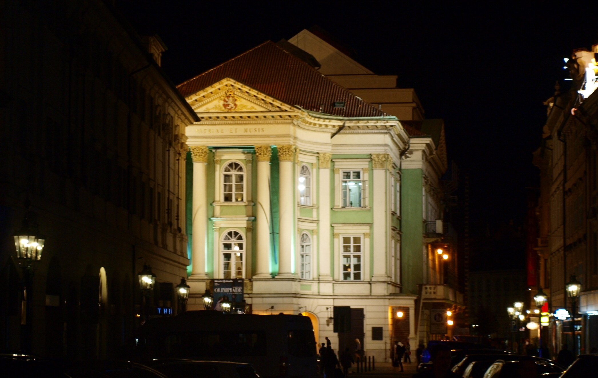 Stavovské divadlo